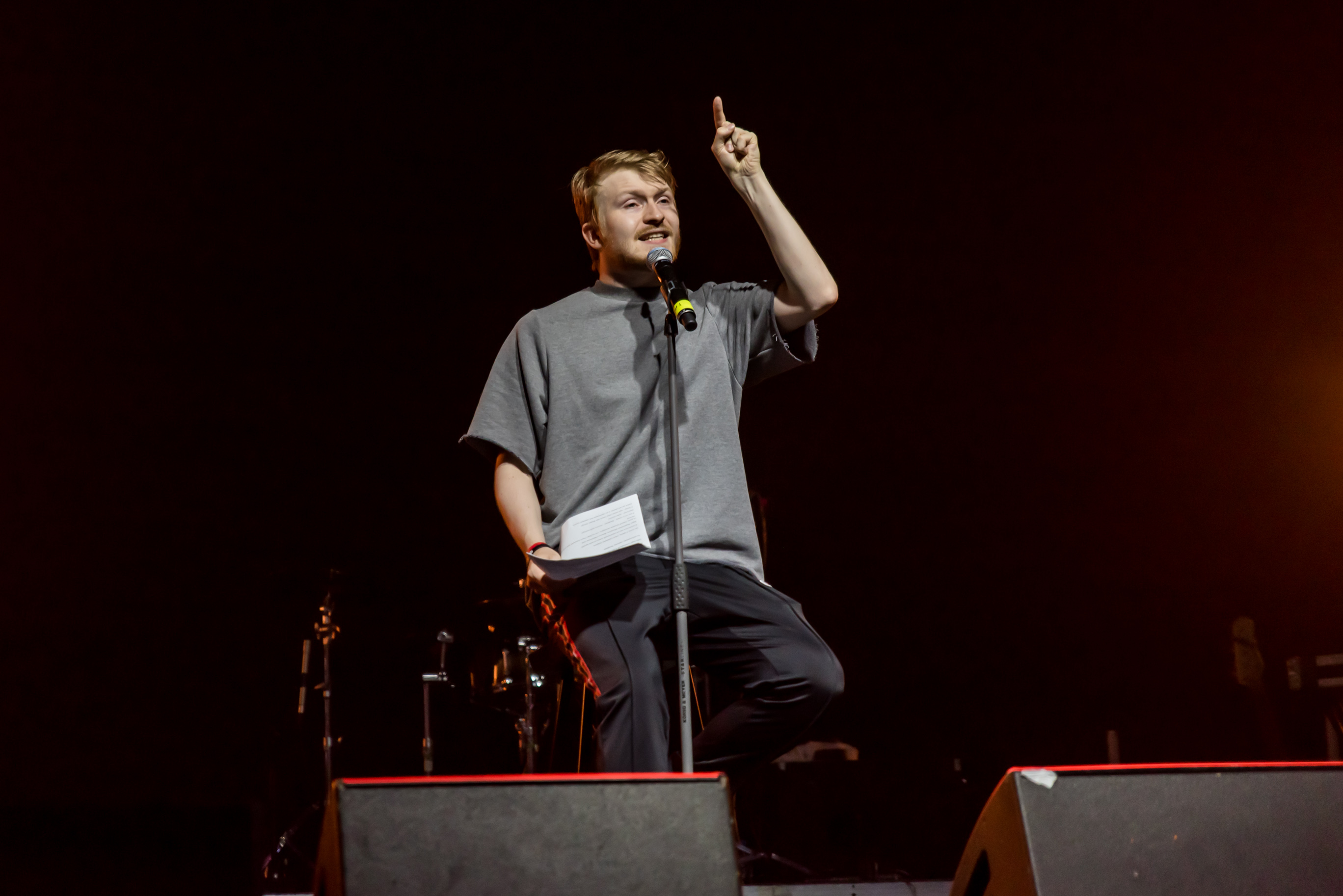 Данила Поперечный (концерт Монеточки в А2)